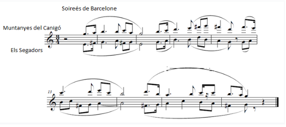 Transcripció dels fragments del ballet Soireés de Barcelone de Robert Gerhard amb melodies catalanes.